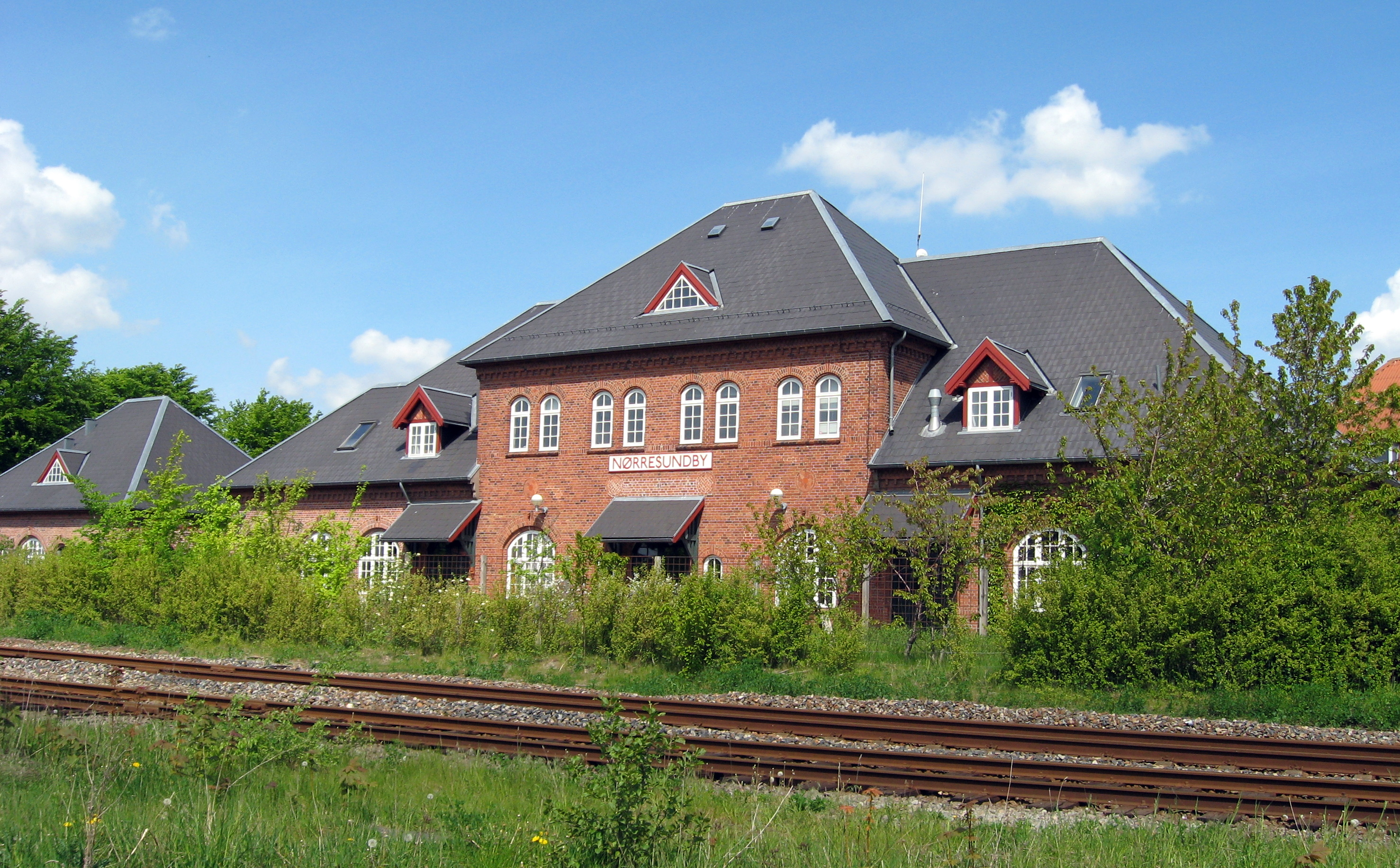 Nørresundby Station